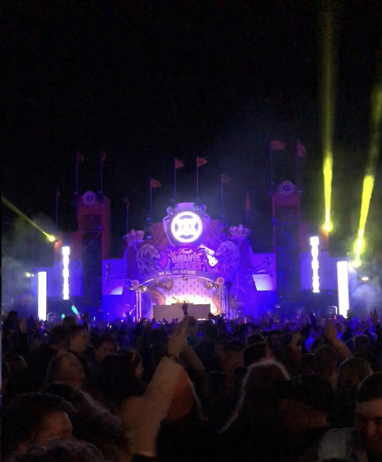 Koningsdag Arnhem